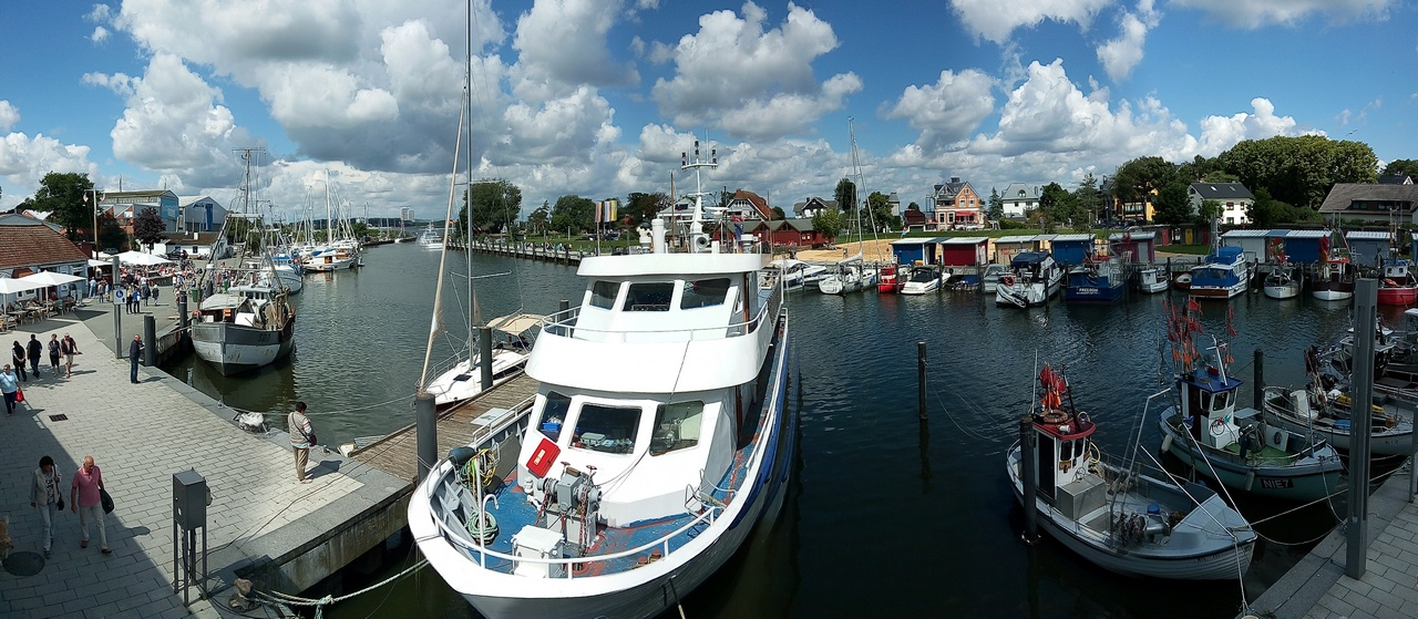 Niendorf / Ostsee / Hafenpanorama